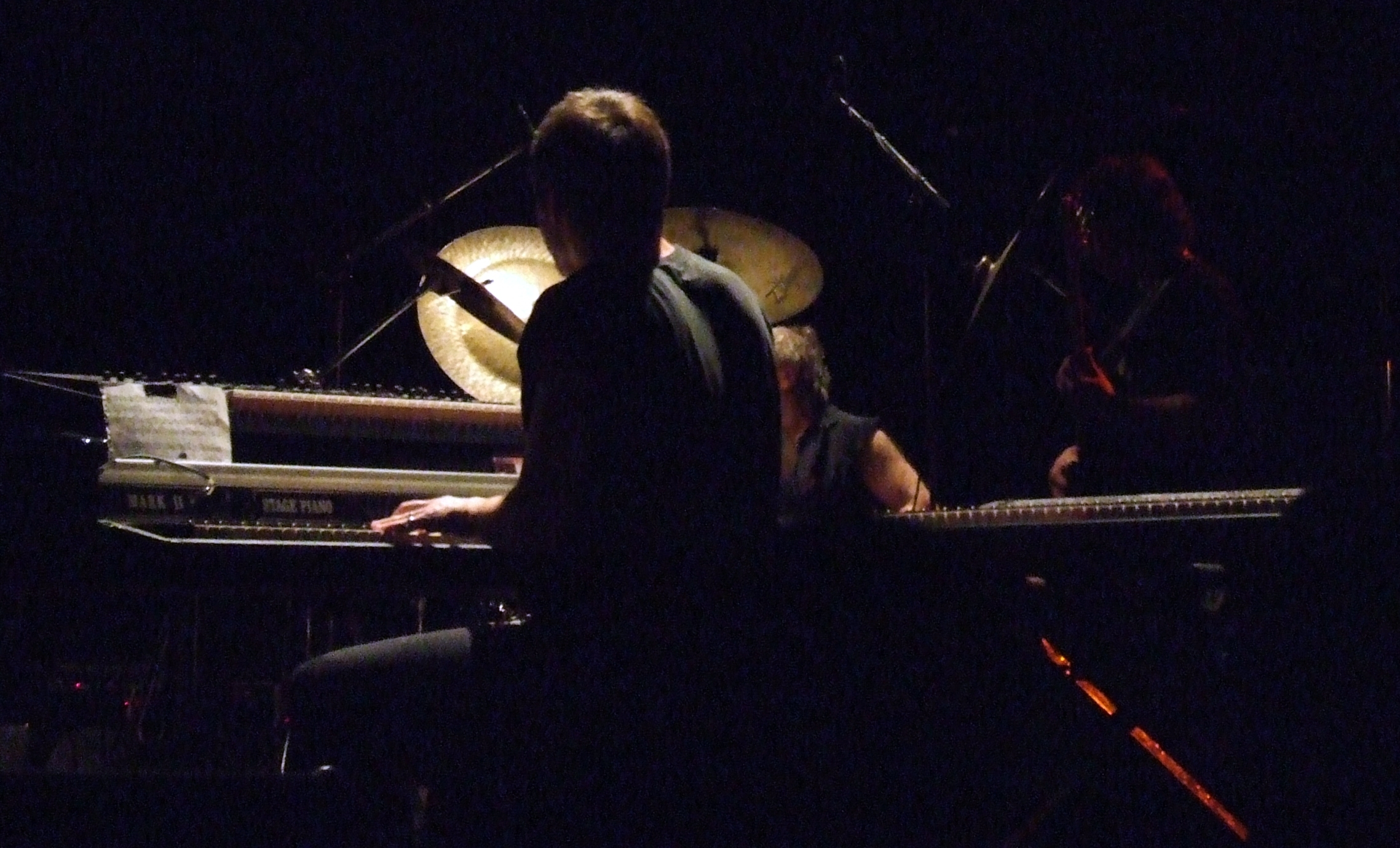 Photo du concert de Magma à la salle des Fetes de Schiltigheim